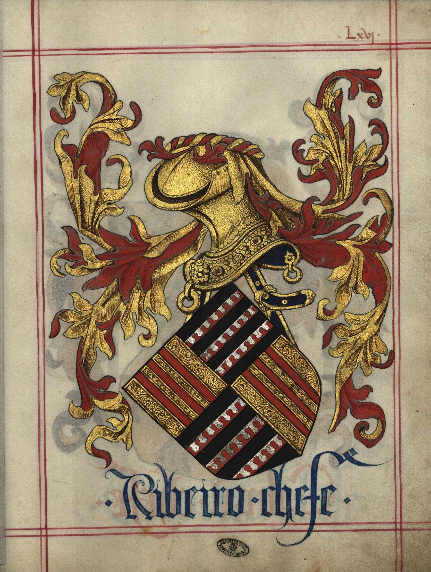 Livro do Armeiro-Mor, Ribeiro (fl 66)